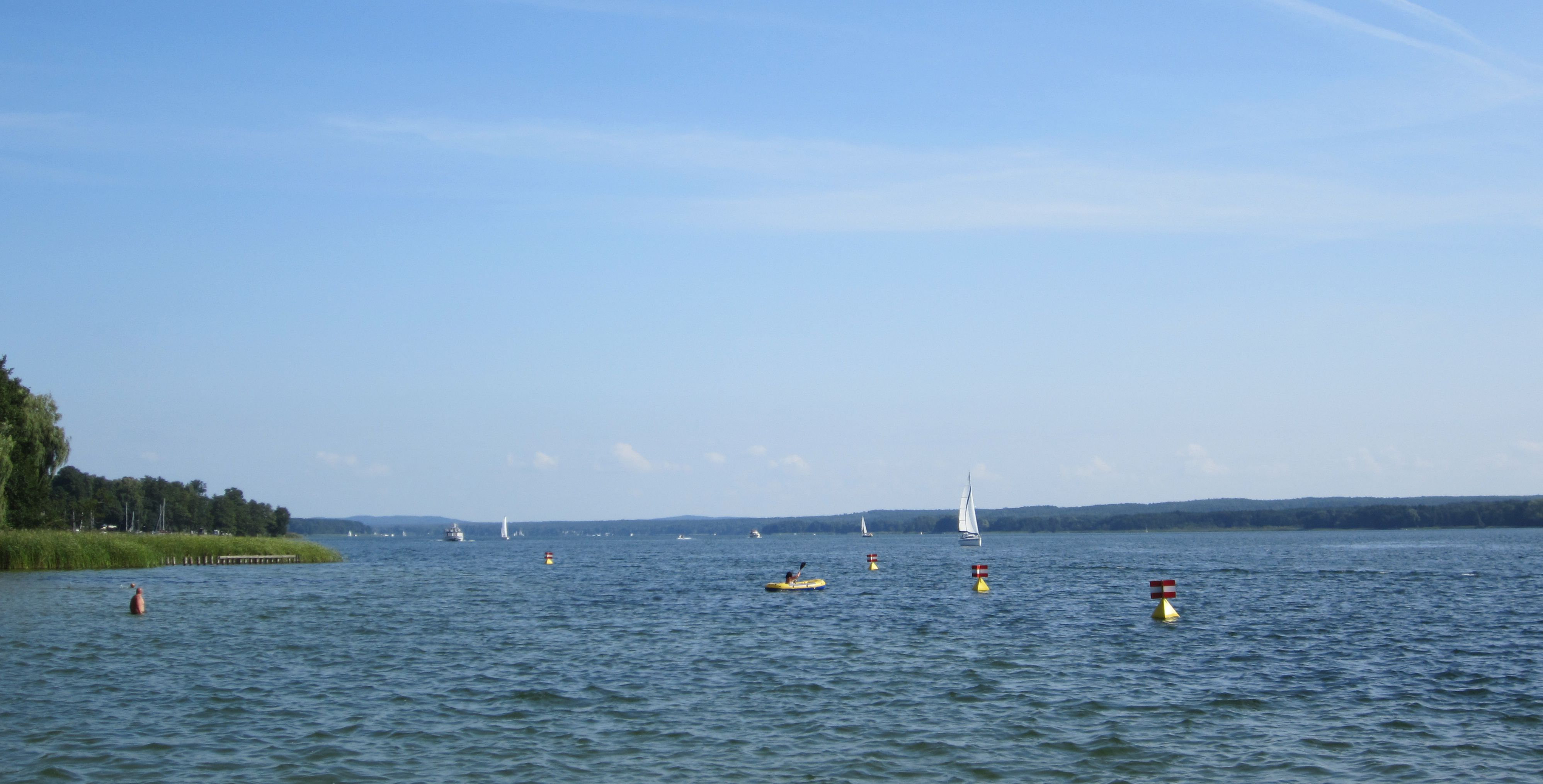 Blick über den Scharmützelsee vom Strand in Wendisch Rietz